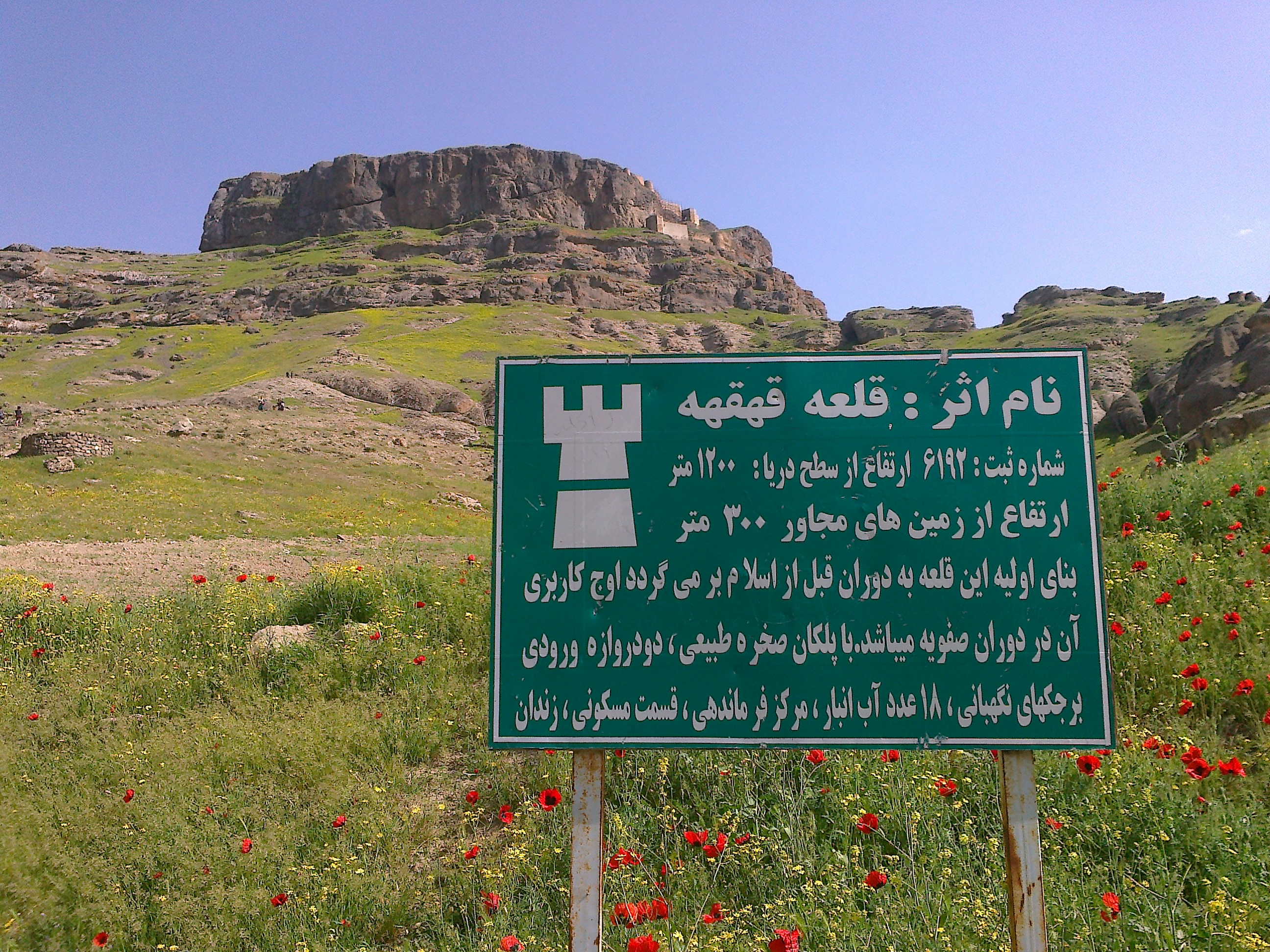 قلعه قهقهه